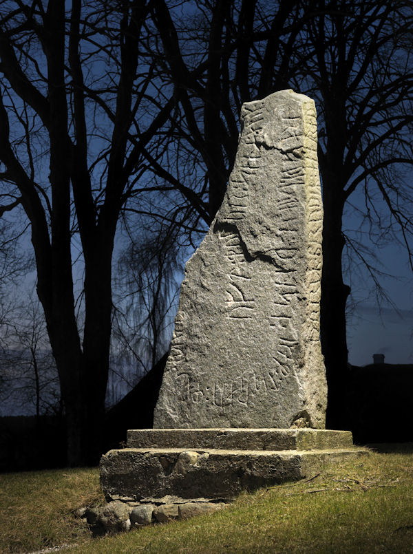 Foto: Nationalmuseet ved Roberto Fortuna